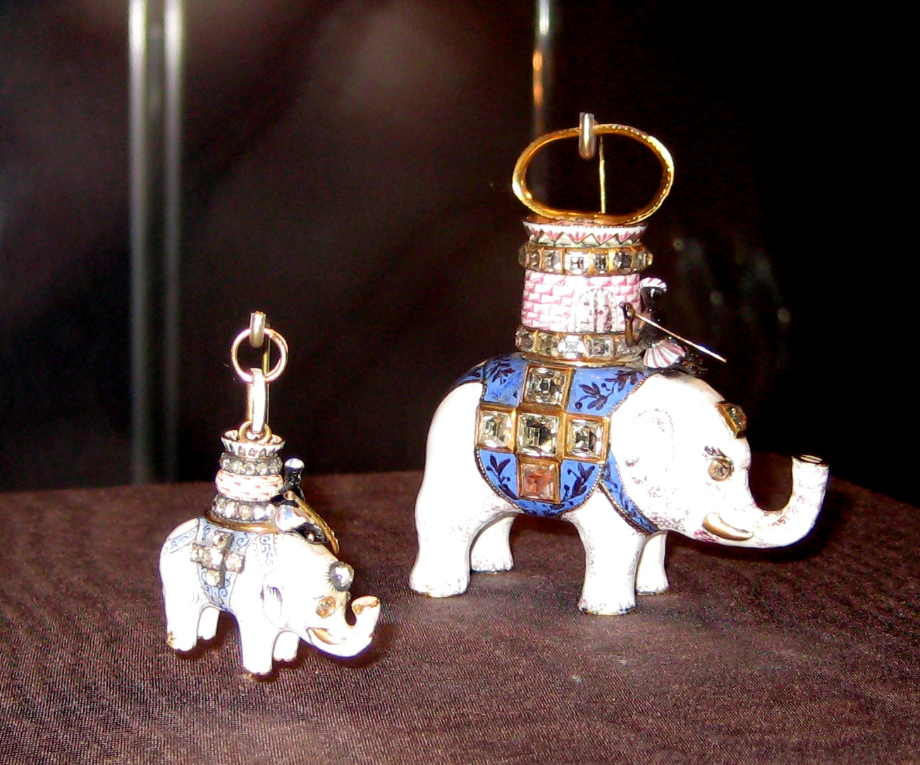 Знаки ордена слона, 19 век.